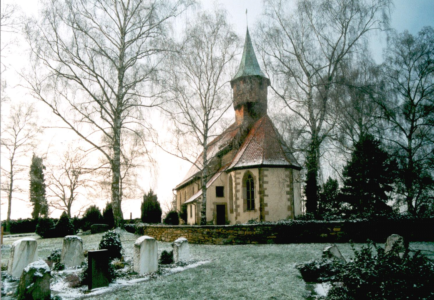 Belsener Kapelle von Südosten. Eigene Fotografie vom Januar 2003.